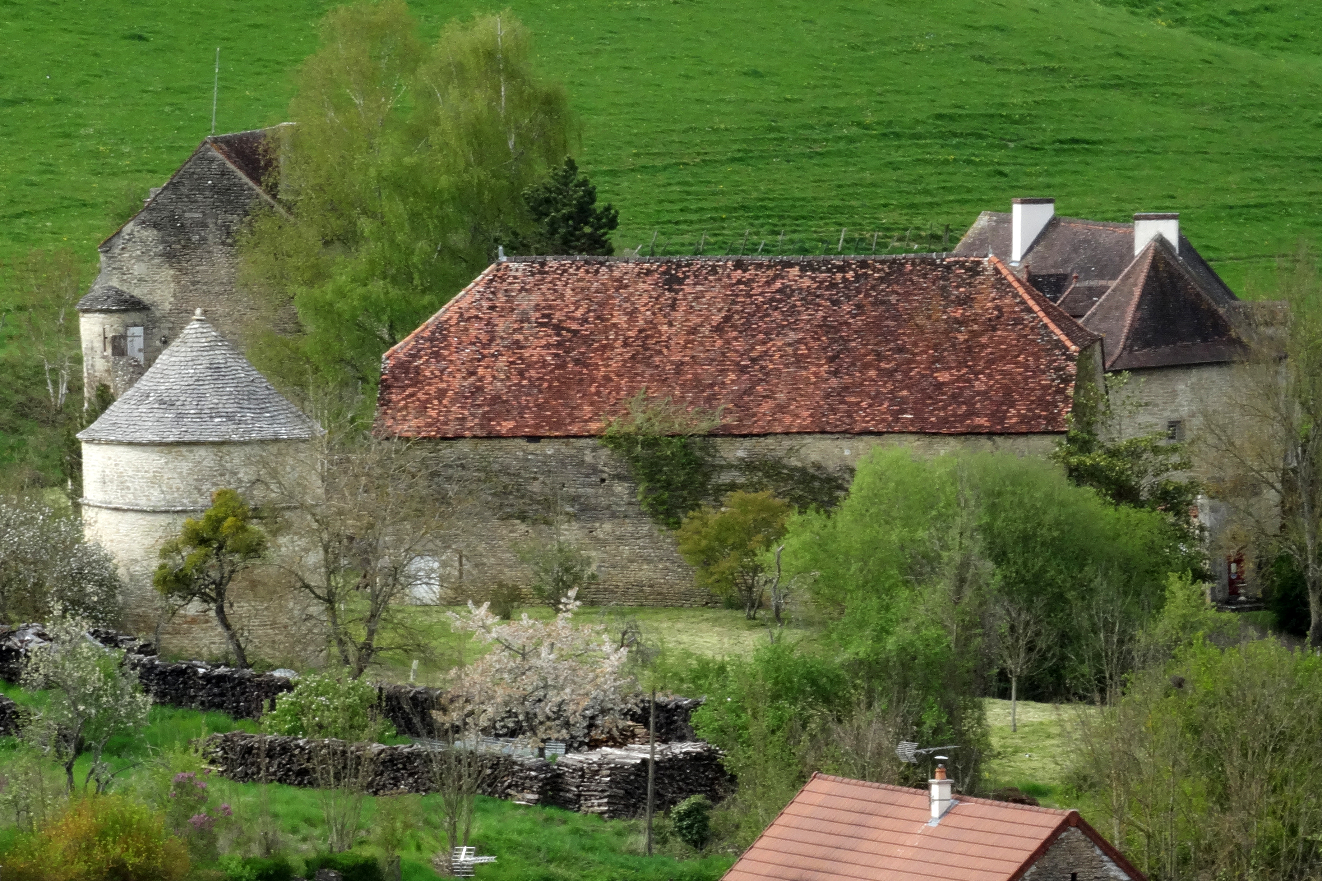 Mussy-la-Fosse (Côte-d'Or)